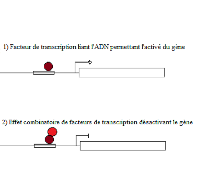 Effet combinatoire des facteurs de transcription